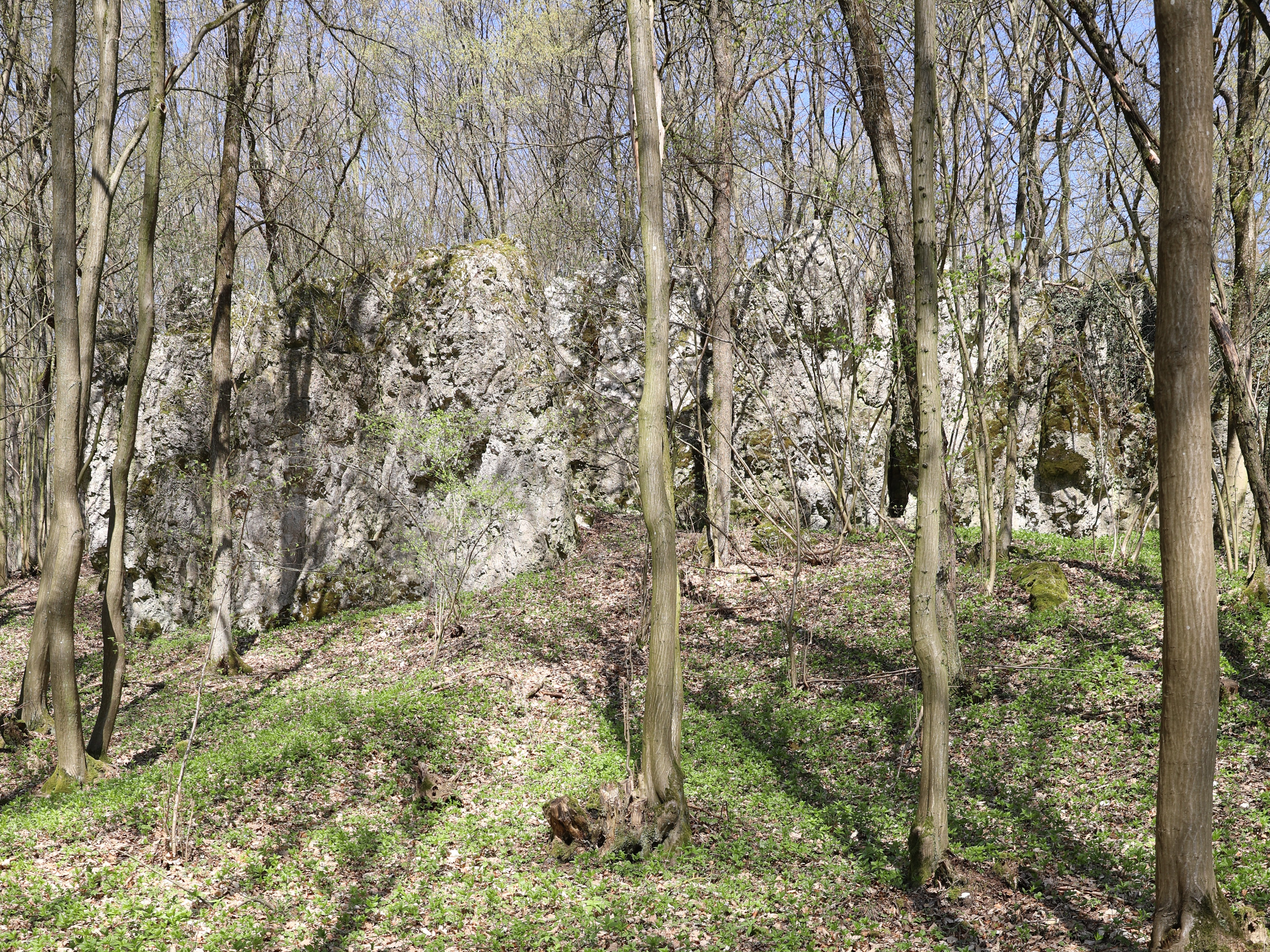 Eierfelsen bei Coburg-Seidmannsdorf